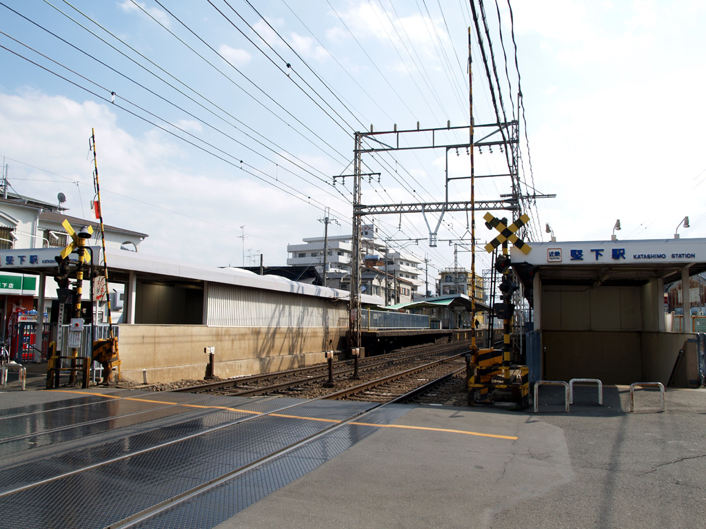 近鉄・堅下駅